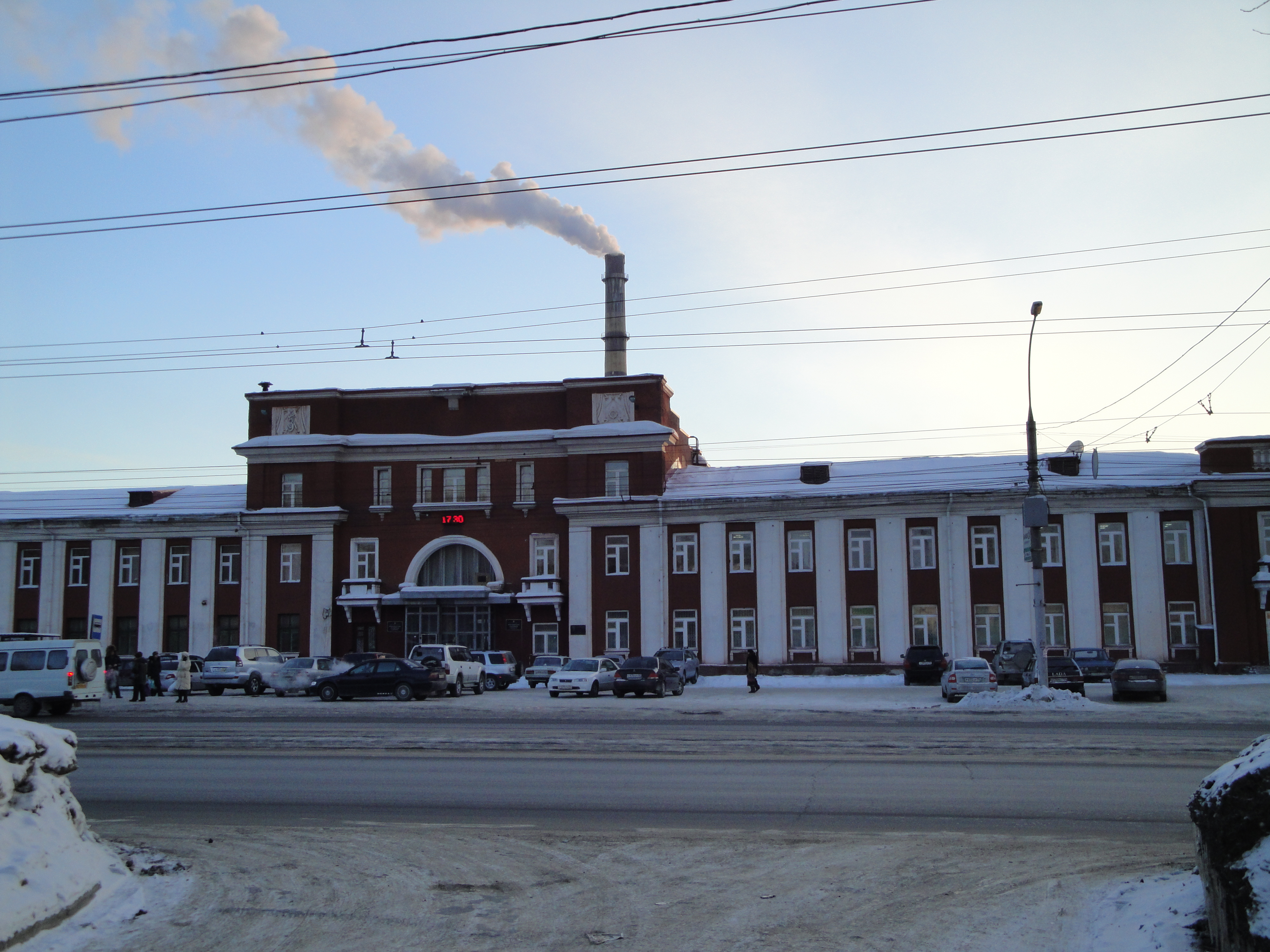 здание Новосибирского оловокомбината и проходная